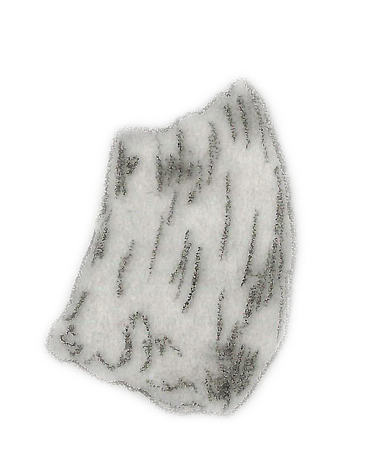 Illustration of a fossil of Szechuanosaurus